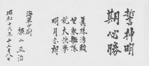 横山正治少佐の遺墨